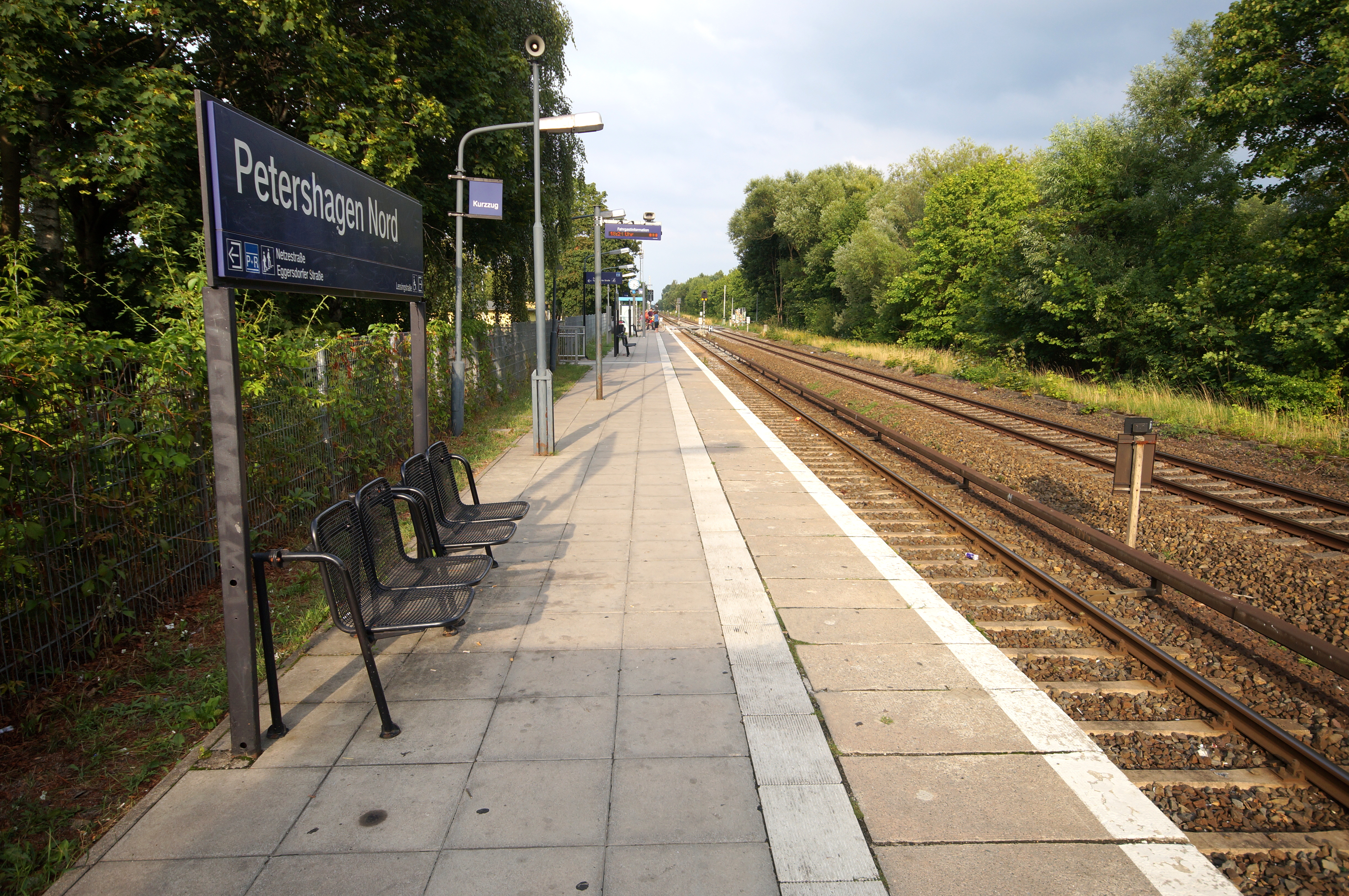 Der Bahnsteig der S-Bahn-Station Petershagen Nord auf der Gemarkung der Gemeinde Petershagen/Eggersdorf in Brandenburg, an dem Züge der Linie S 5 der S-Bahn Berlin halten